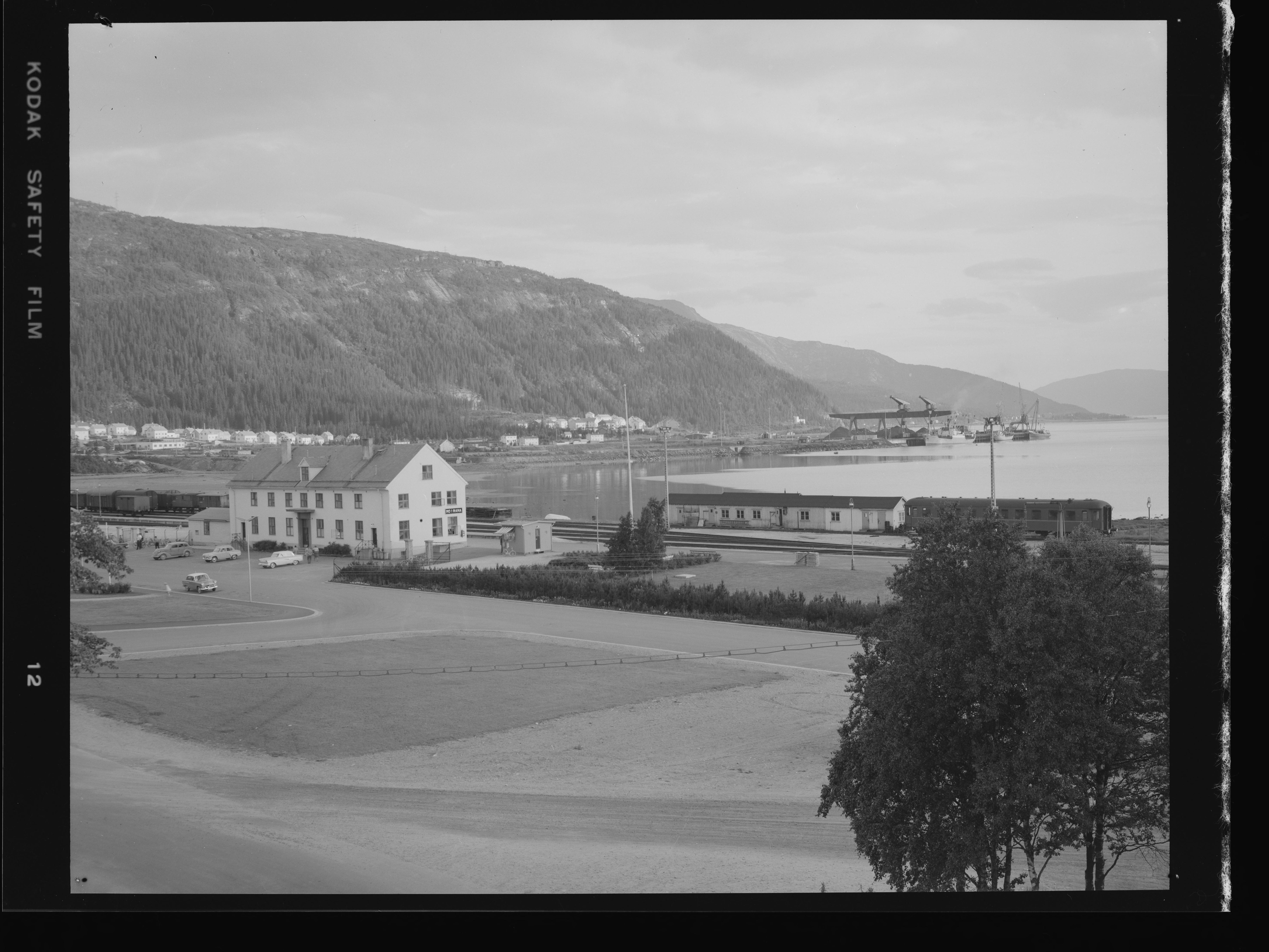 Bildet er hentet fra Nasjonalbibliotekets bildesamling. Anmerkninger til bildet var: Fotograf: L.S Mo i Rana, Rana, Nordland